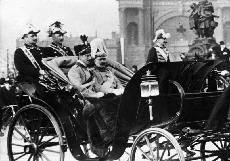 Wilhelm II. und der dänische König Christian X. bei seinem Besuch in Berlin am 24. Februar 1913